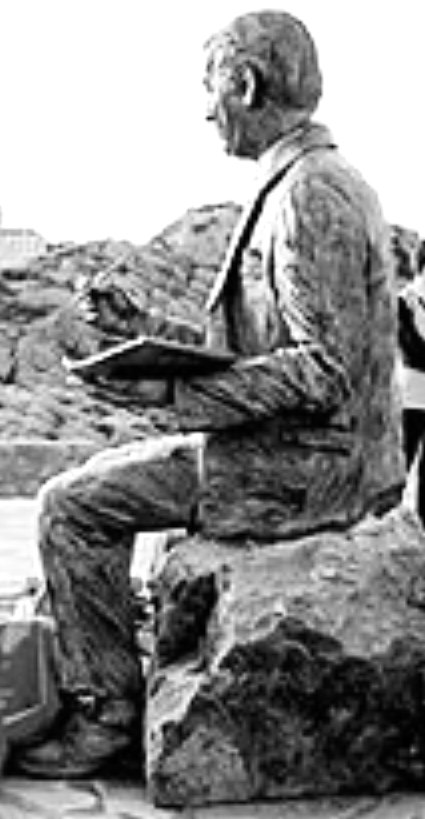 Arturo Dúo Vital, escultura de Lourdes Umerez, Bronce 1,80 m, 2001 Castro-Urdiales (Cantabria).